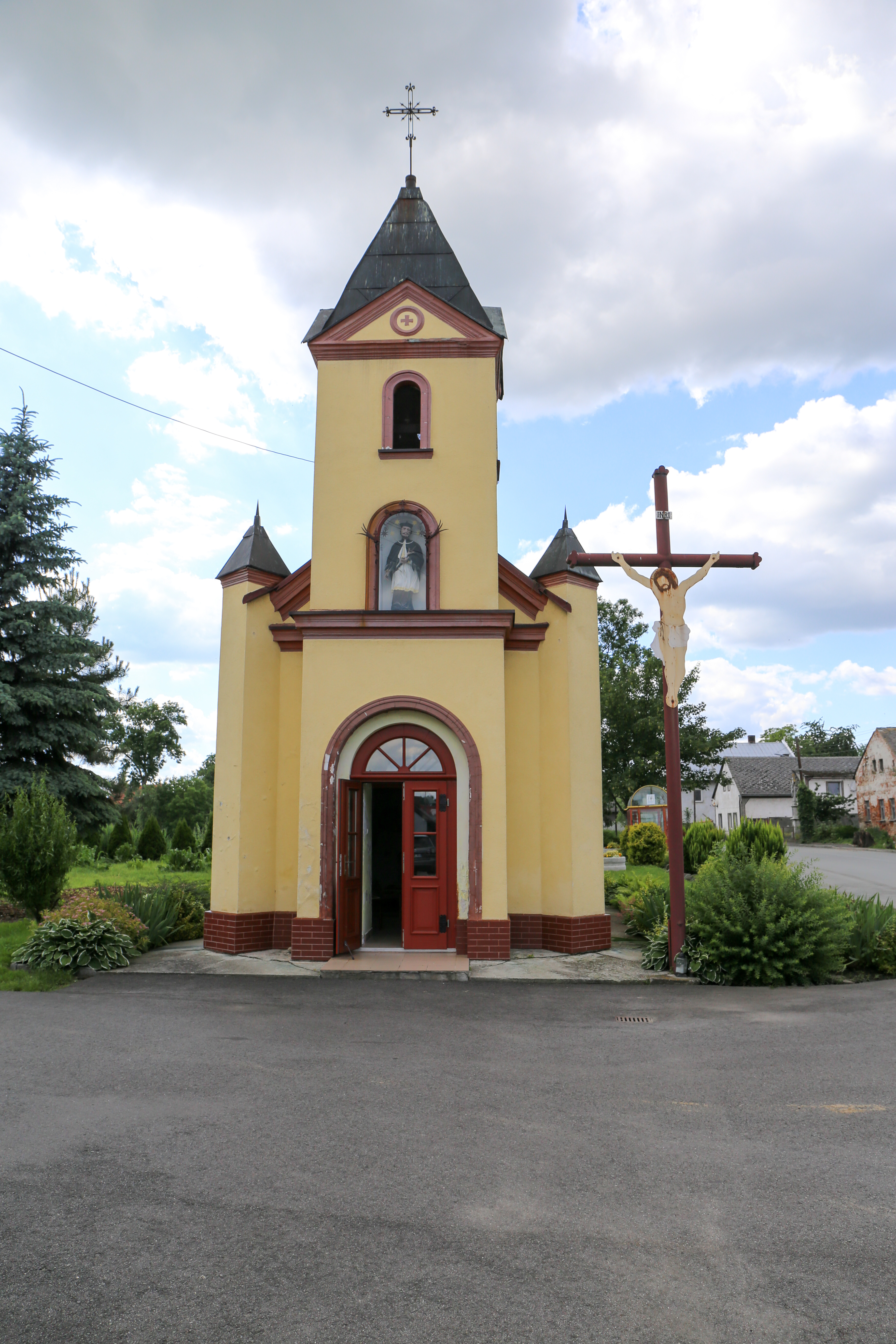 Dobrosławice - wieś w Polsce położona w województwie opolskim, w powiecie kędzierzyńsko-kozielskim, w gminie Pawłowiczki.